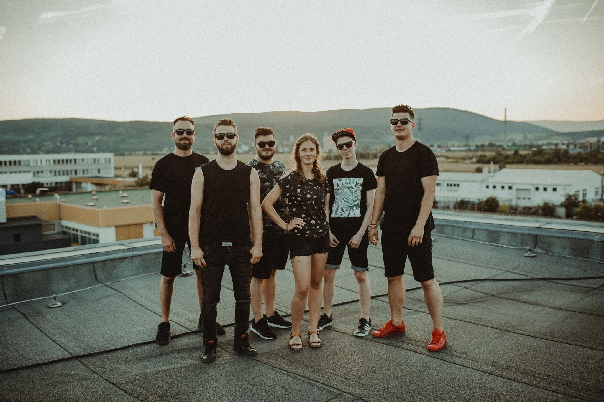 Natáčanie klipu Neočkaávam